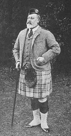 König Edward VII at Balmoral.